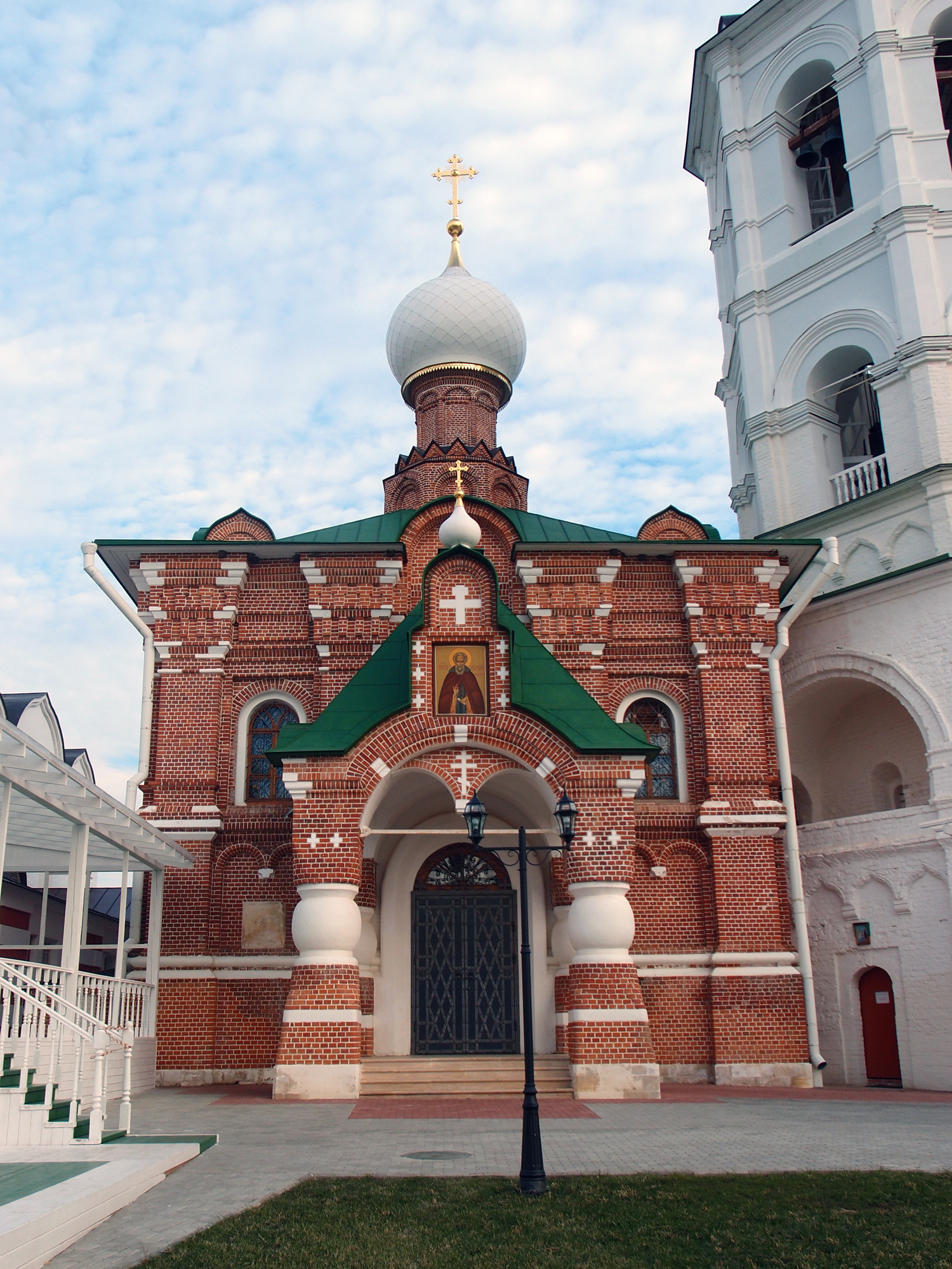 Николо-Пешношский монастырь (Москва и Московская область, Солнечногорск, село Рогачево (посёлок Луговой))